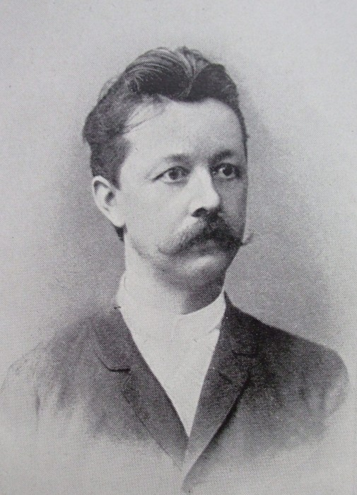 Sochař Mořic Černil, Vilímek, Národní album, 1899, s. 96.